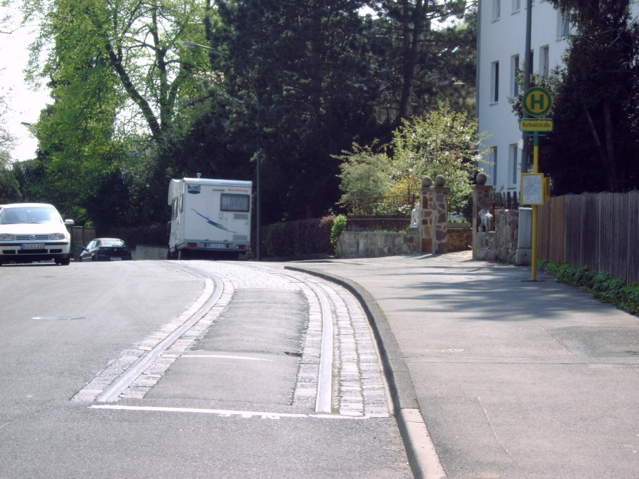 Ende der Strecke zur Kurhhausstraße Kategorie:Bild:Straßenbahn